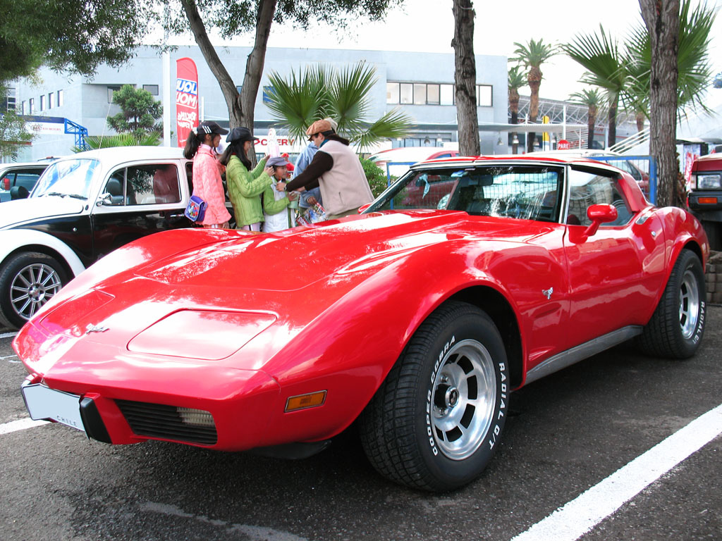 Chevrolet Corvette C3 1978